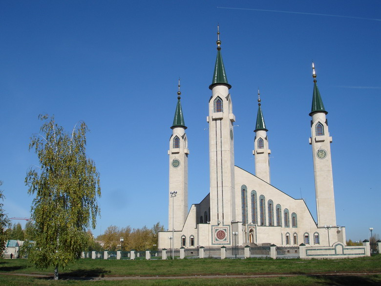 Соборная мечеть г. Нижнекамск, Татарстан, Россия